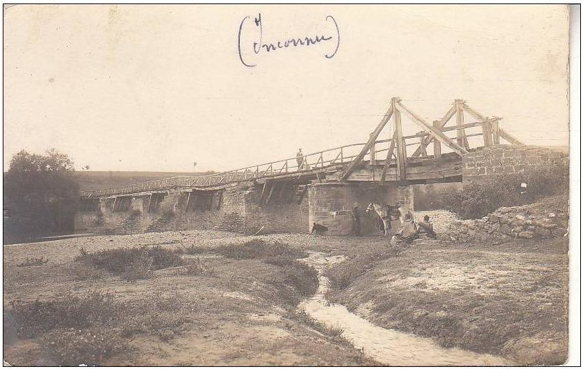 Мост при Любойно през Първата световна война